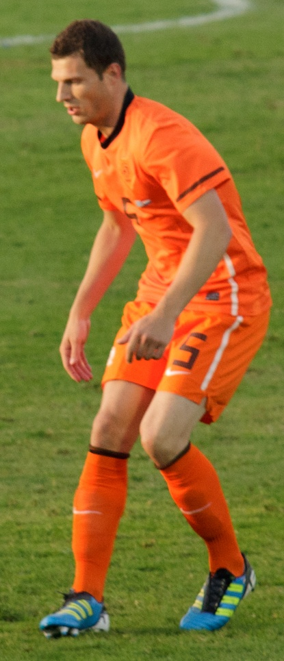 Erik Pieters